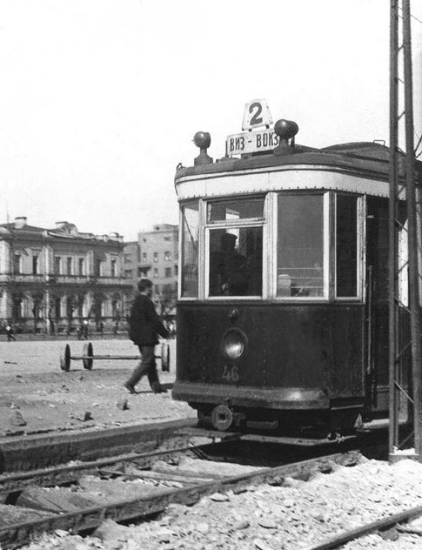 Маршрут № 2 «ВИЗ — Вокзал»